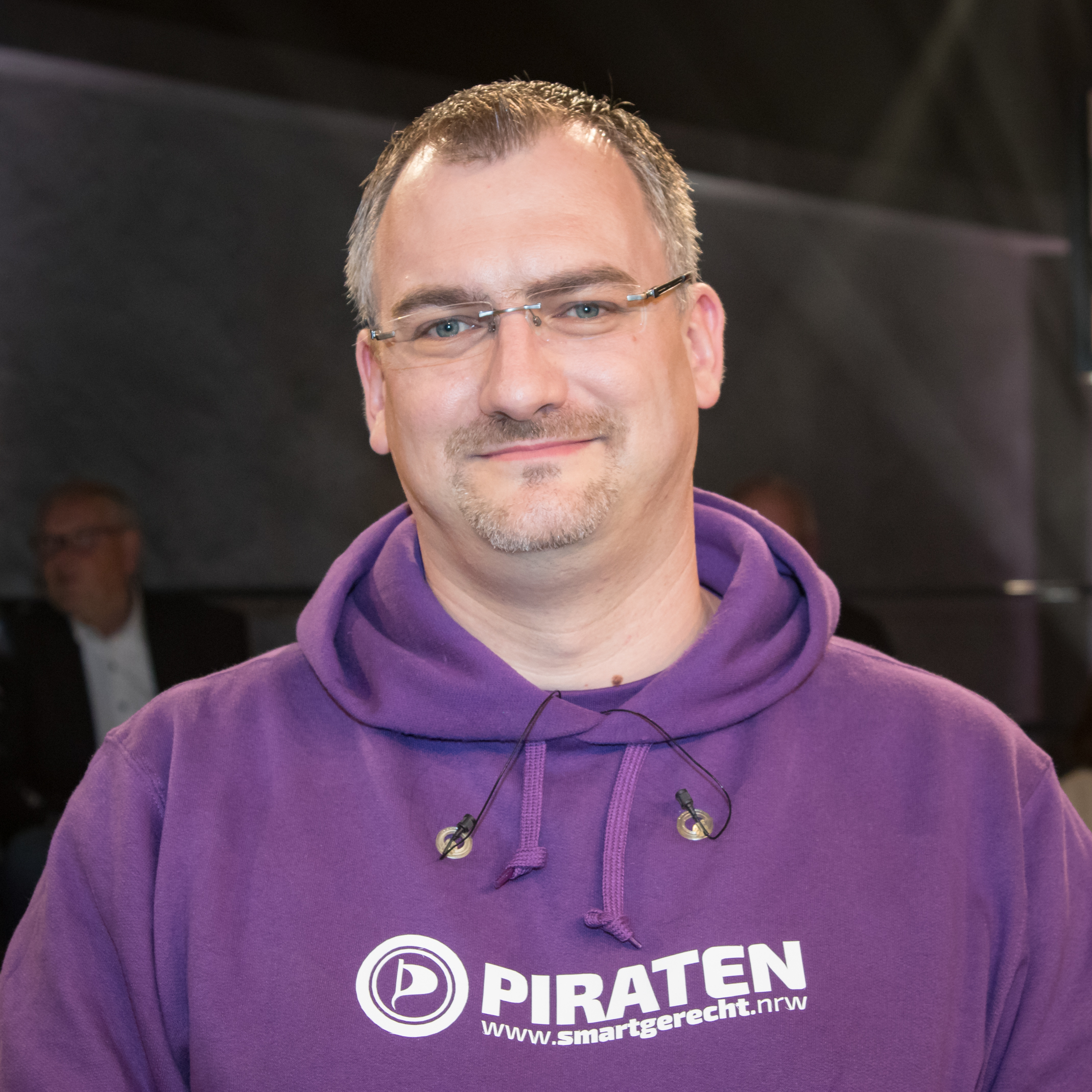 WDR-Sendung Wahl-Arena, Donnerstag, 4. Mai 2017 zur NRW-Wahl: Michele Marsching